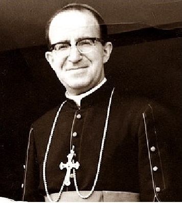 Mons. Luis Mena Arroyo